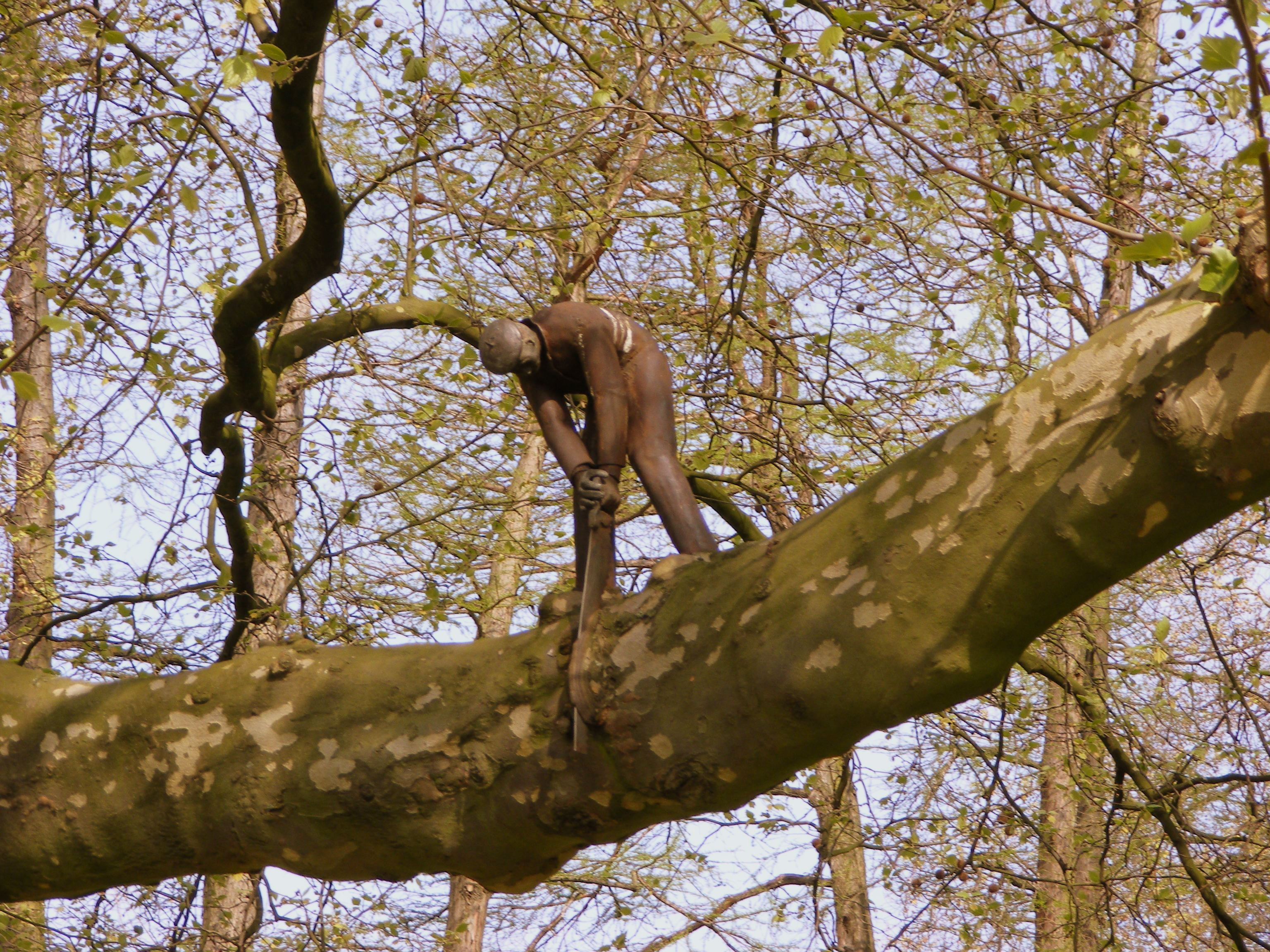 De boomzager (1982) by an anonymous sculptor, Leidse bosje, Amsterdam (oude plaats)